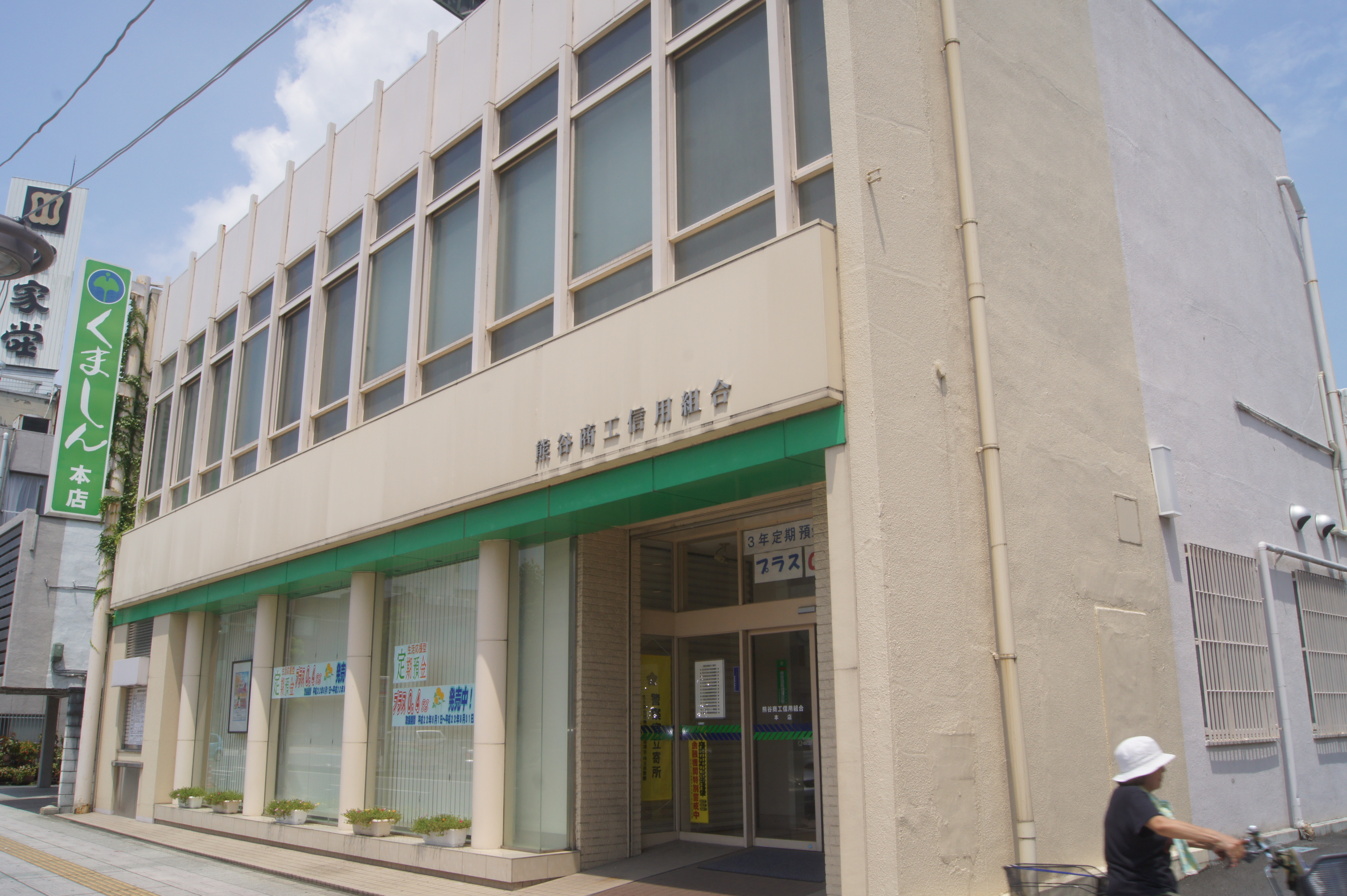 熊谷商工信用組合本店